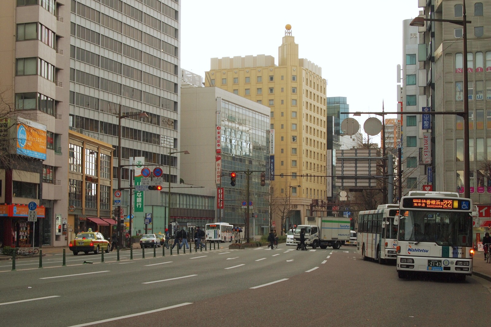 福岡県福岡市天神の天神3丁目、通称北天神付近の様子。